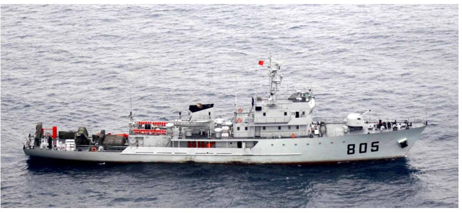 中文（台灣）: 081型舷號805掃雷艦